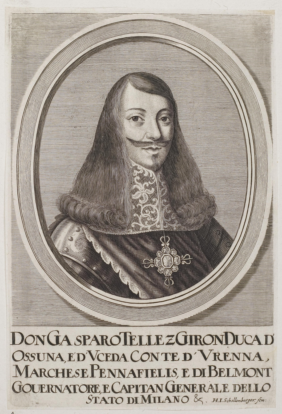 Gaspar Téllez-Girón y Sandoval. Grafik aus dem Klebeband Nr. 2 der Fürstlich Waldeckschen Hofbibliothek Arolsen.